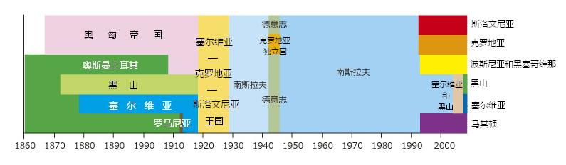 近代南斯拉夫历史